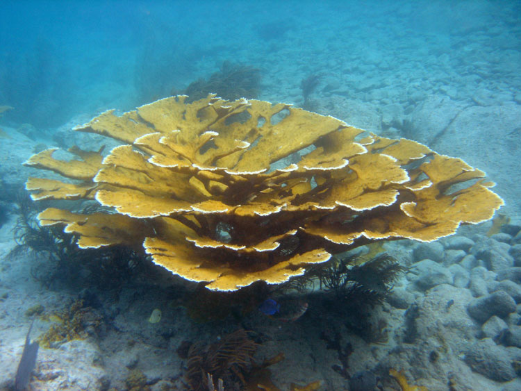 Acropora palmata, en el Parque Nacional de las islas Vírgenes, isla San John, EE.UU.